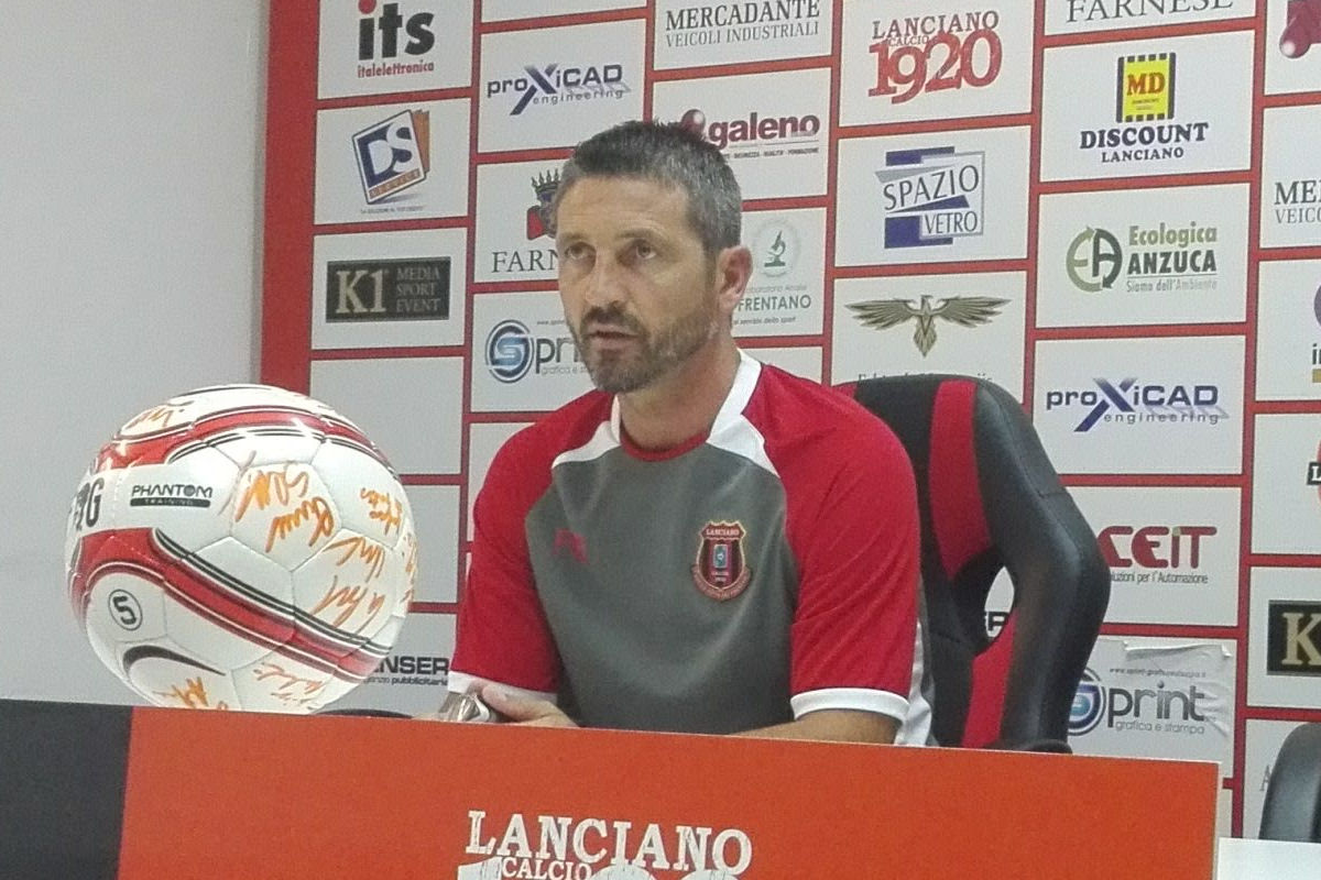 Del Grosso durante una conferenza stampa da allenatore del Lanciano